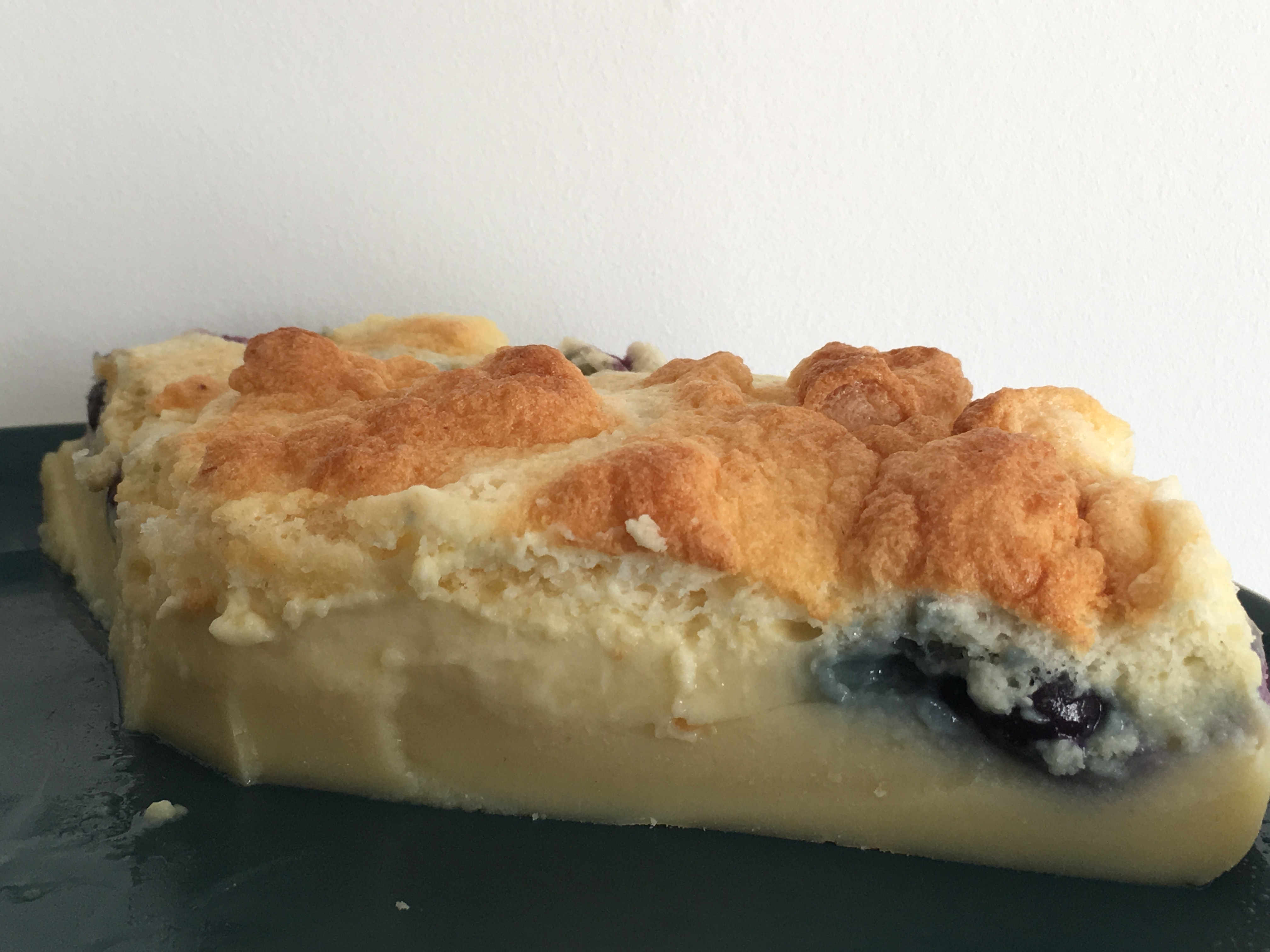 coupe gâteau magique aux myrtilles